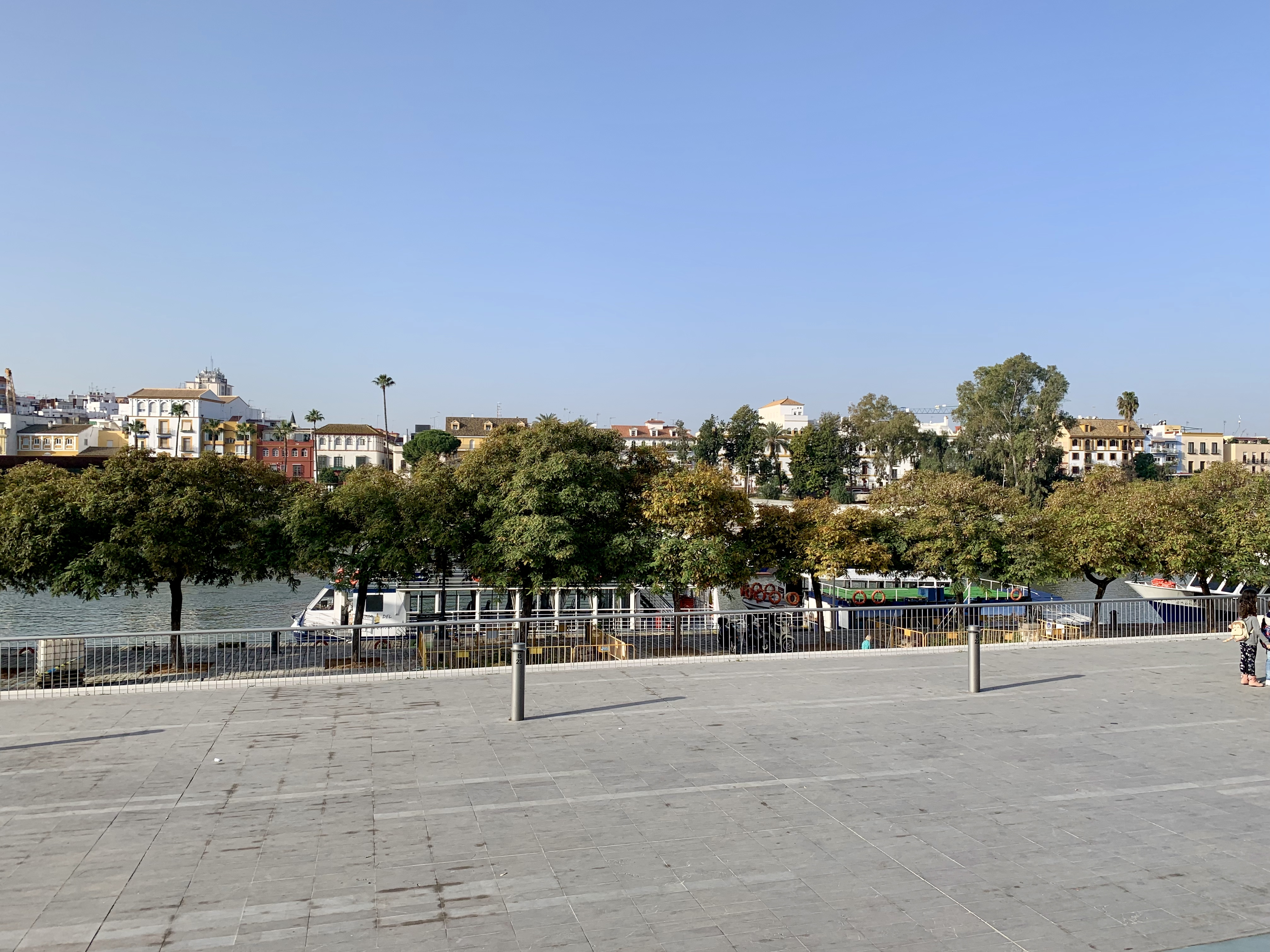 Siviglia, skyline della città con in primo piano veduta prospettica dei tetti e del fiume Guadalquivir